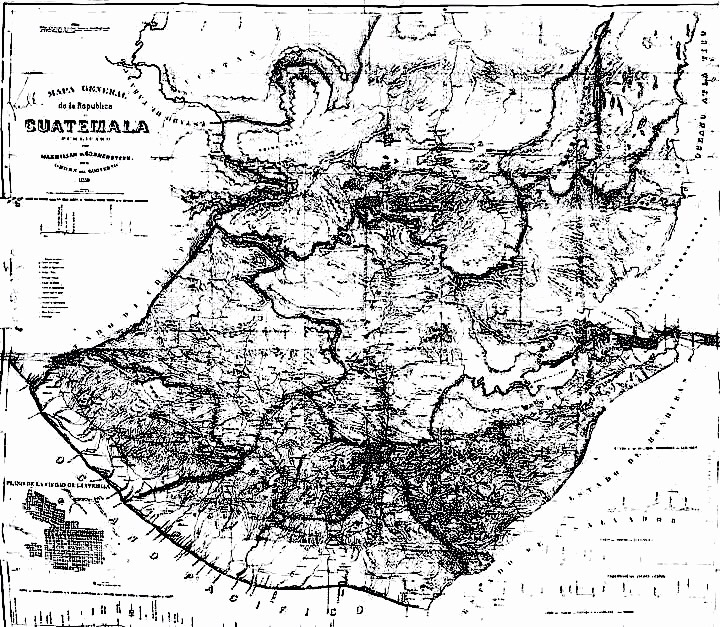 Mapa elaborado por el gobierno de Guatemala en 1847 tras la fundación de la República.